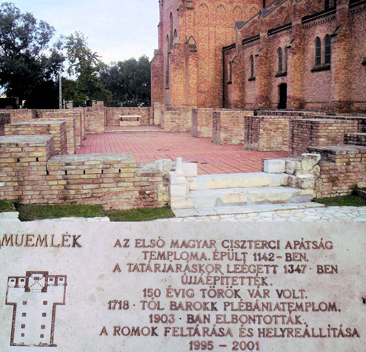 Az első magyar ciszterci apátság templomának feltárása (Bátaszék)